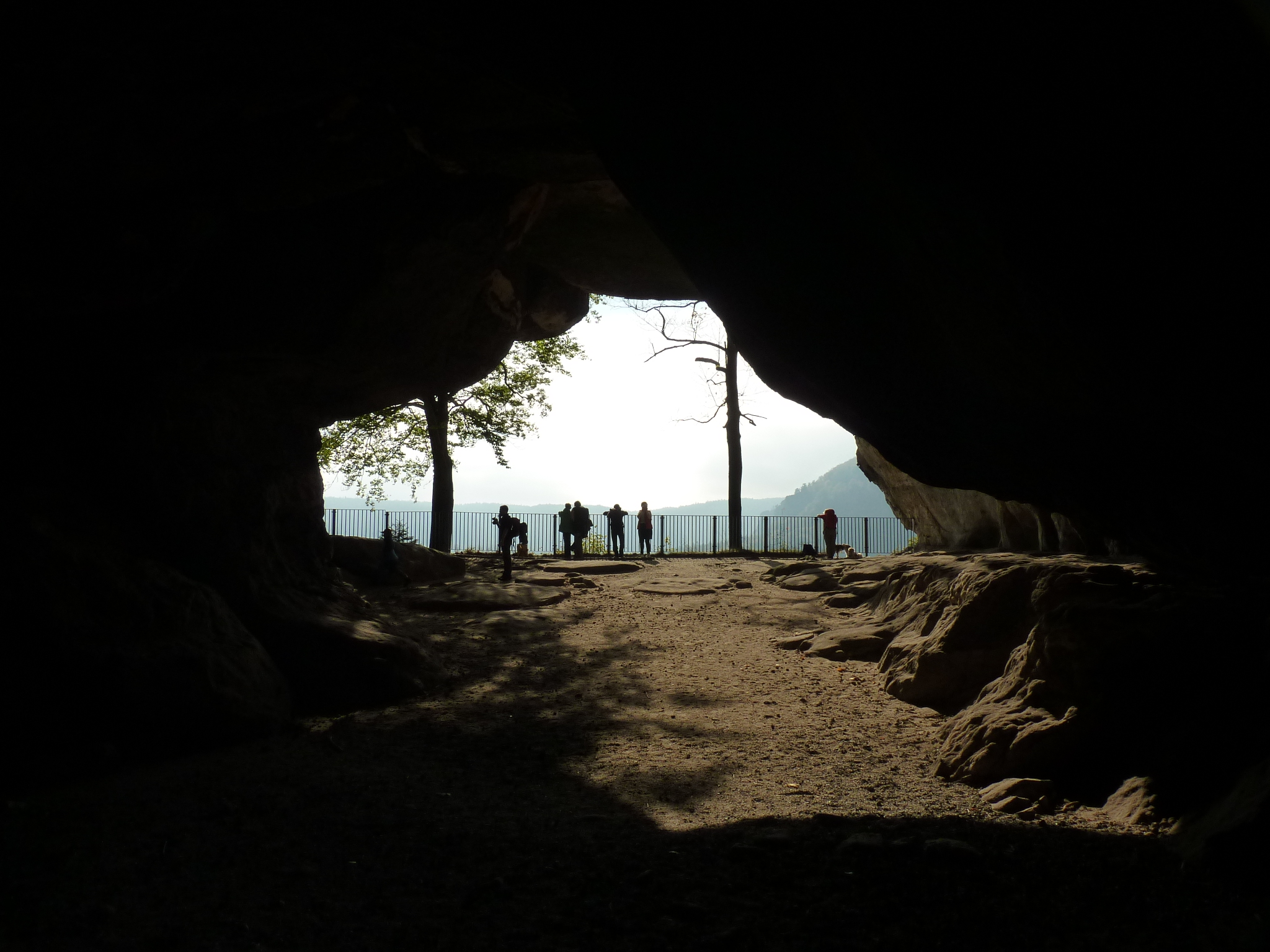 Blick durch das Felsentor Kuhstall im Oktober 2014